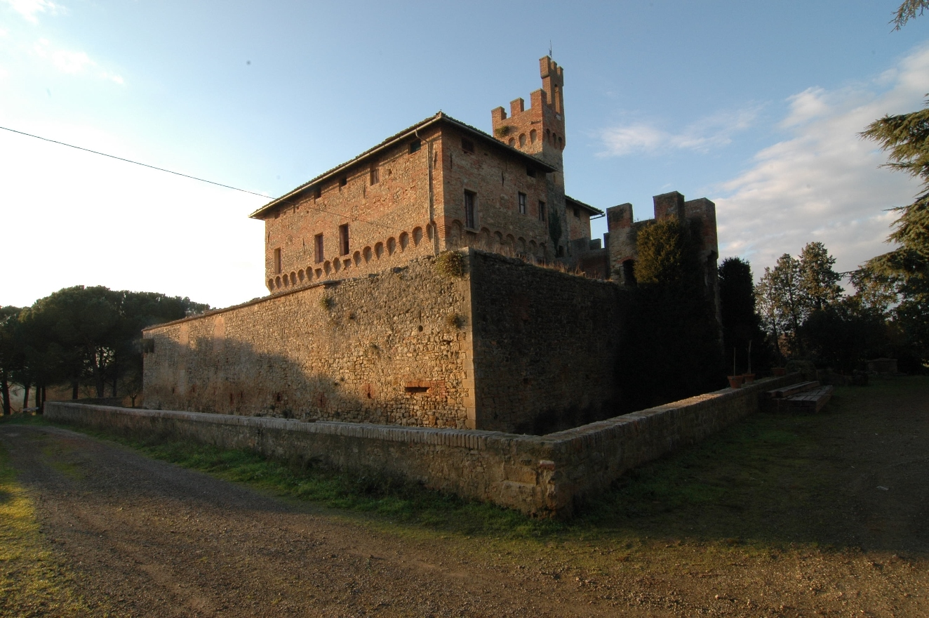 Comune di Buonconvento Castello di Bibbiano